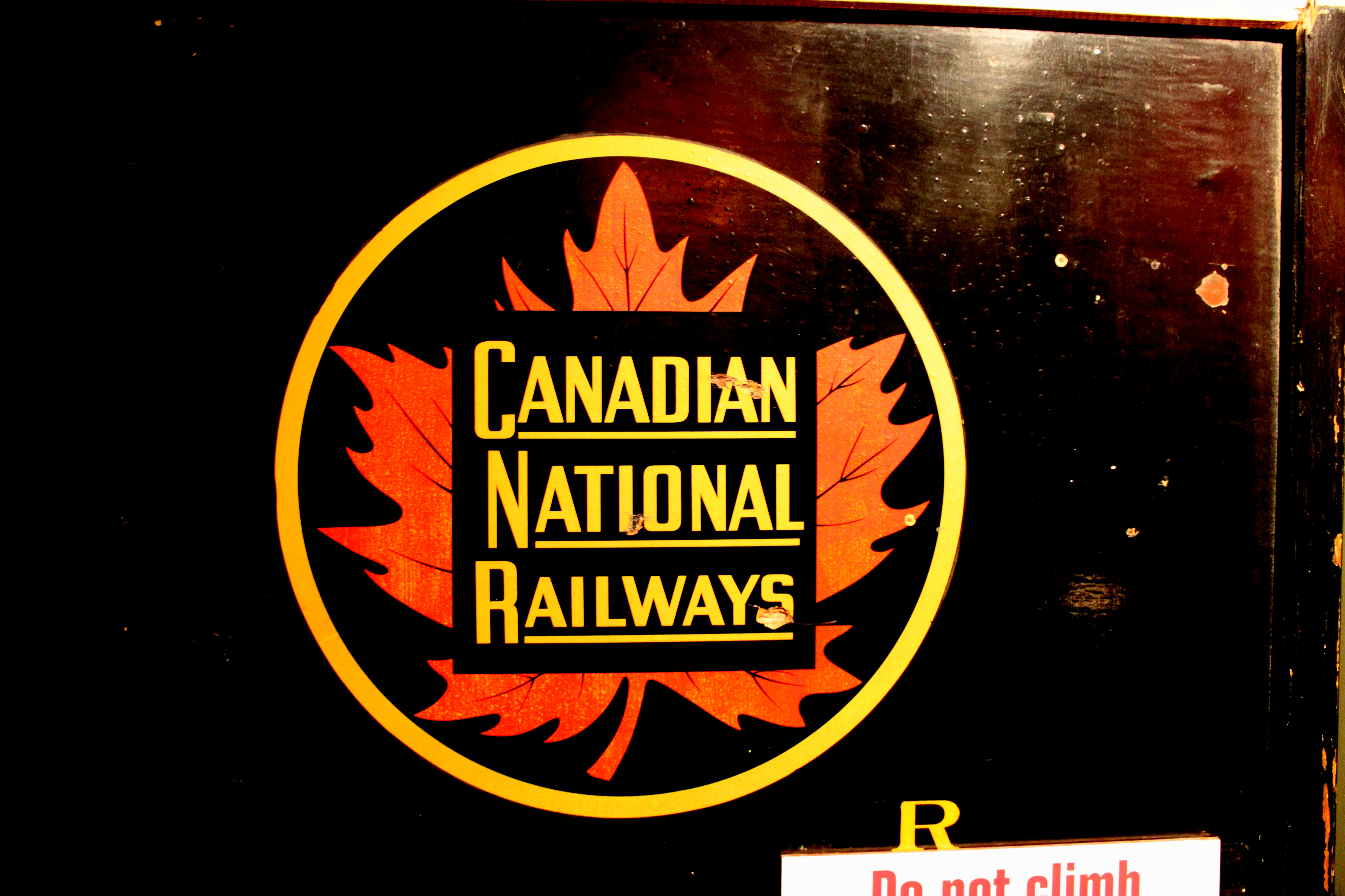 The old logo of CN.